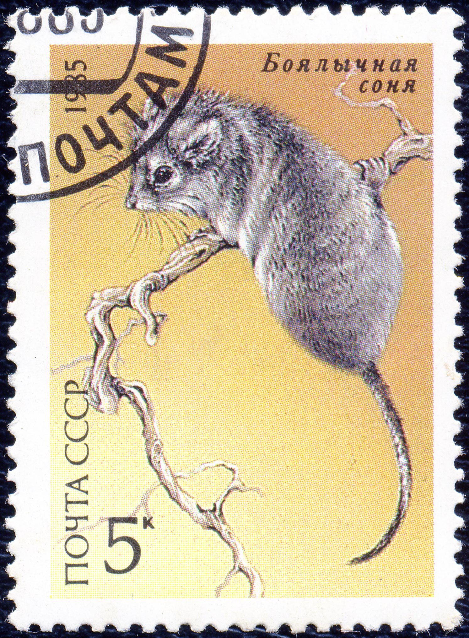 Почтовая марка СССР. 1985. Боялычная соня